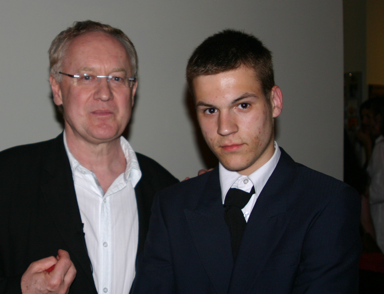 Robert Gliński (links) und Daniel Furmaniak bei der Vorstellung des Films Ich, Tomek (Świnki) in Halle im Kino am Zoo.